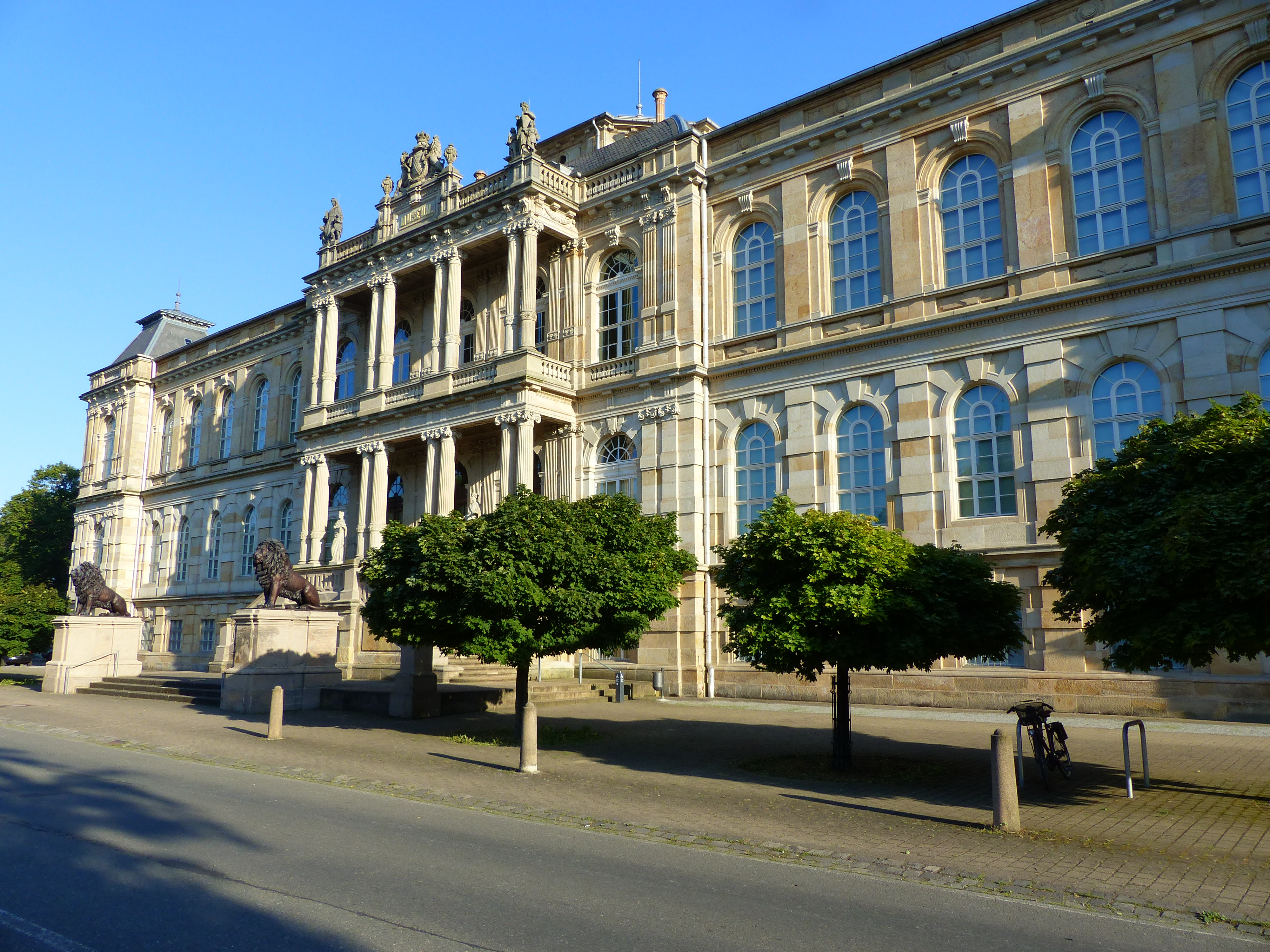 Herzogliches Museum Gotha